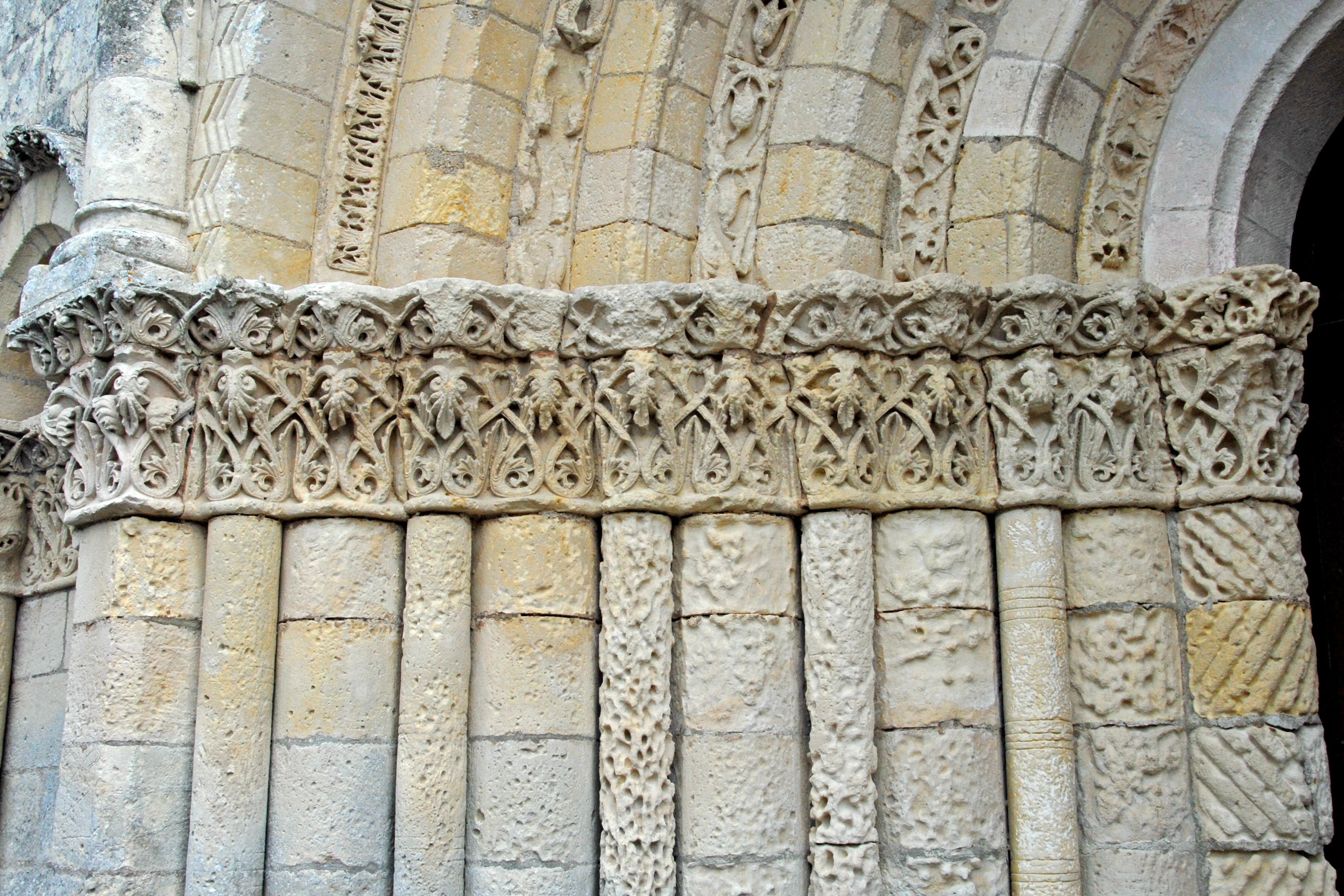 Echebrune, St.-Pierre, Archivolten-Kapitelle